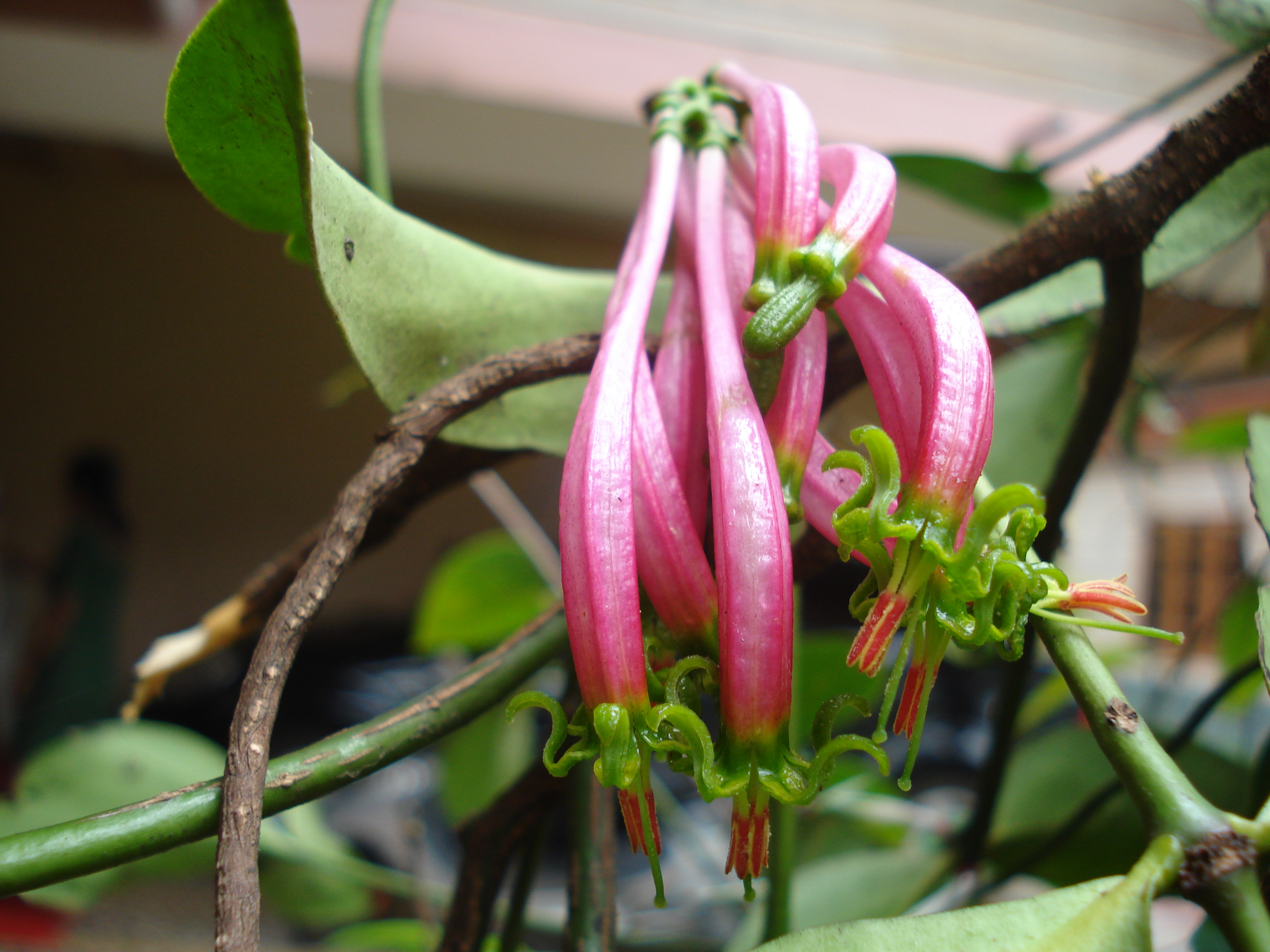 മാവിലും പ്ലാവിലും കയറിപ്പിടിച്ച് വളരുന്നു ഈ വള്ളിച്ചെടി .